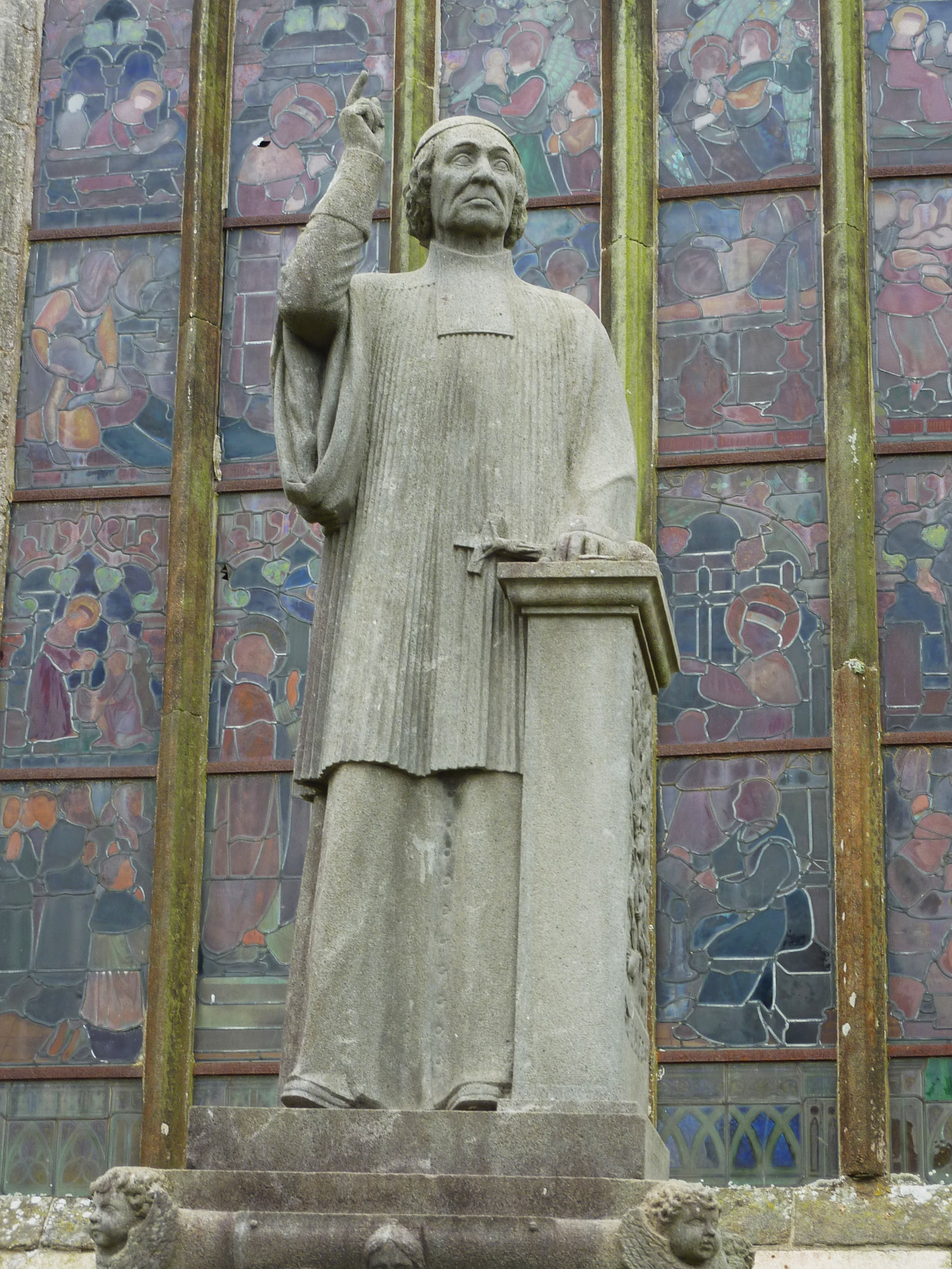 Plougonven: statue de Bernard François sur sa tombe dans l'enclos paroissial (ancien curé de la paroisse)